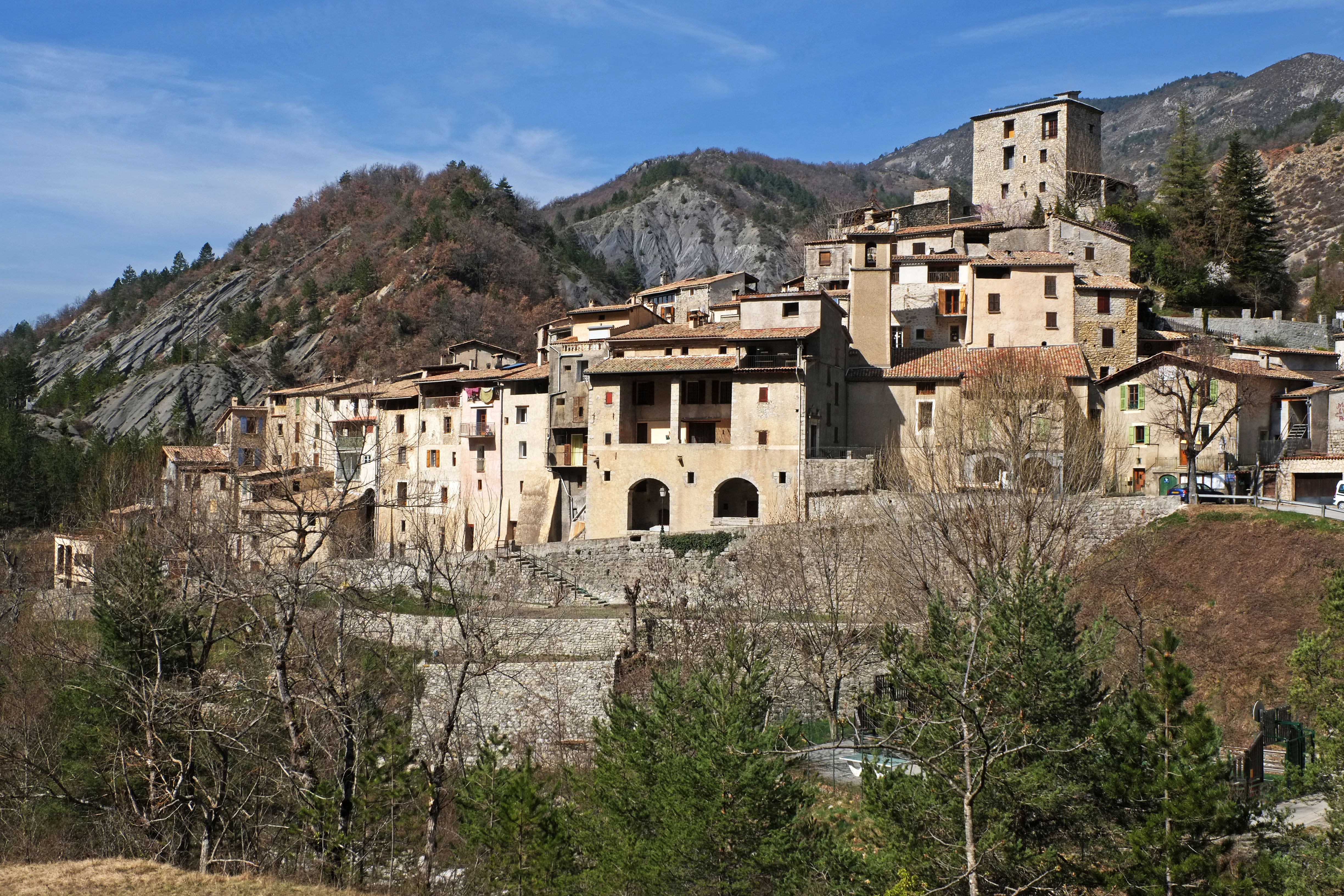 Vue du village de Puget-Rostang depuis le sentier Sainte-Catherine